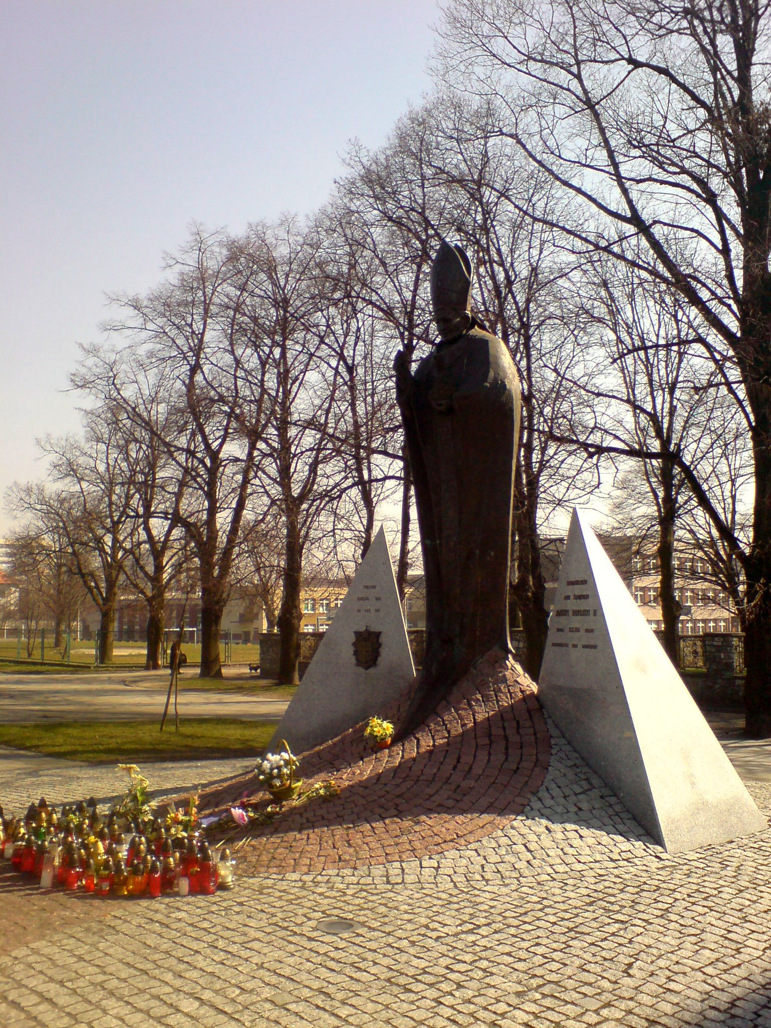 Pomnik Jana Pawła II w Raciborzu